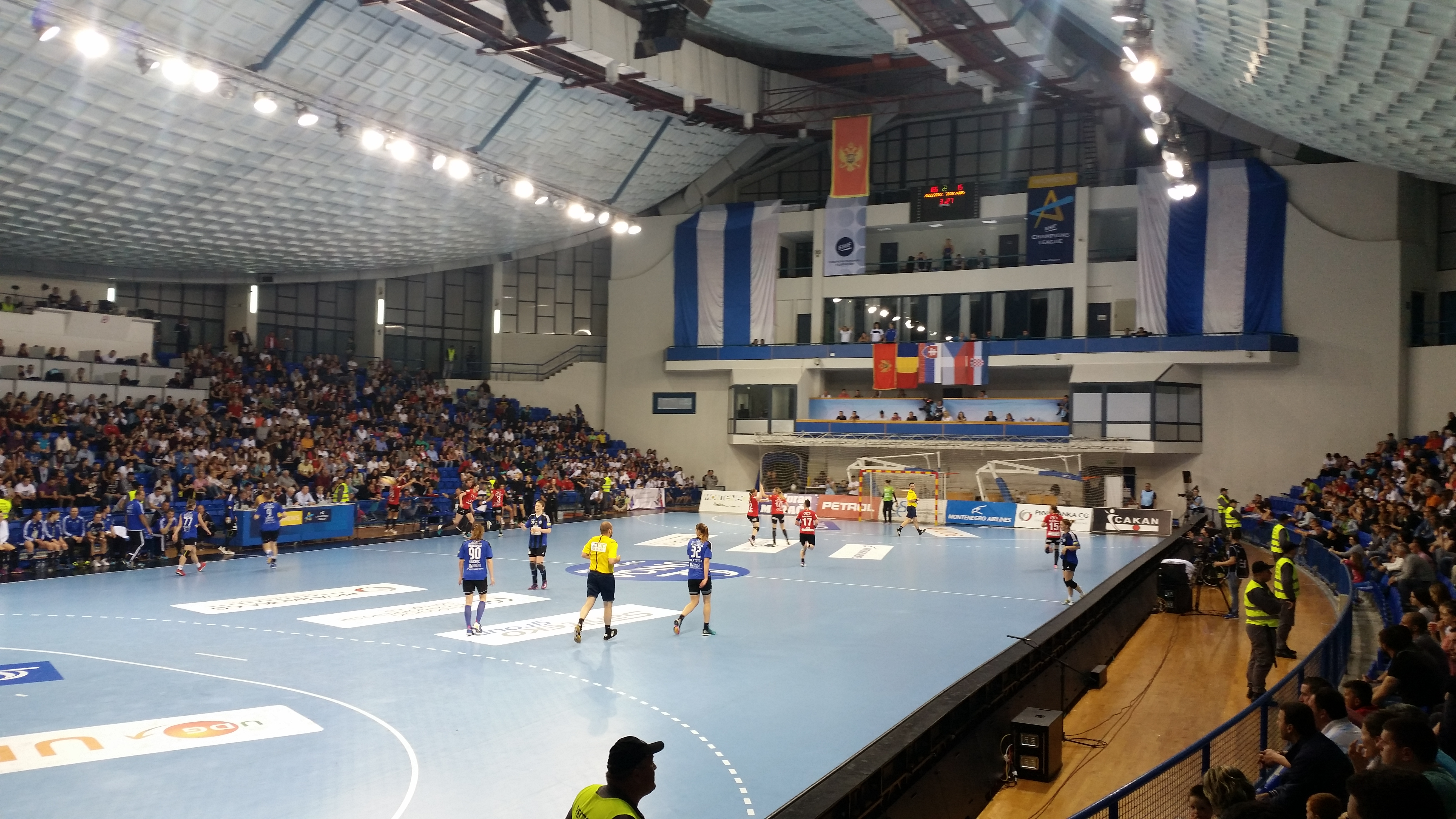 Novi Grad, Podgorica, Montenegro